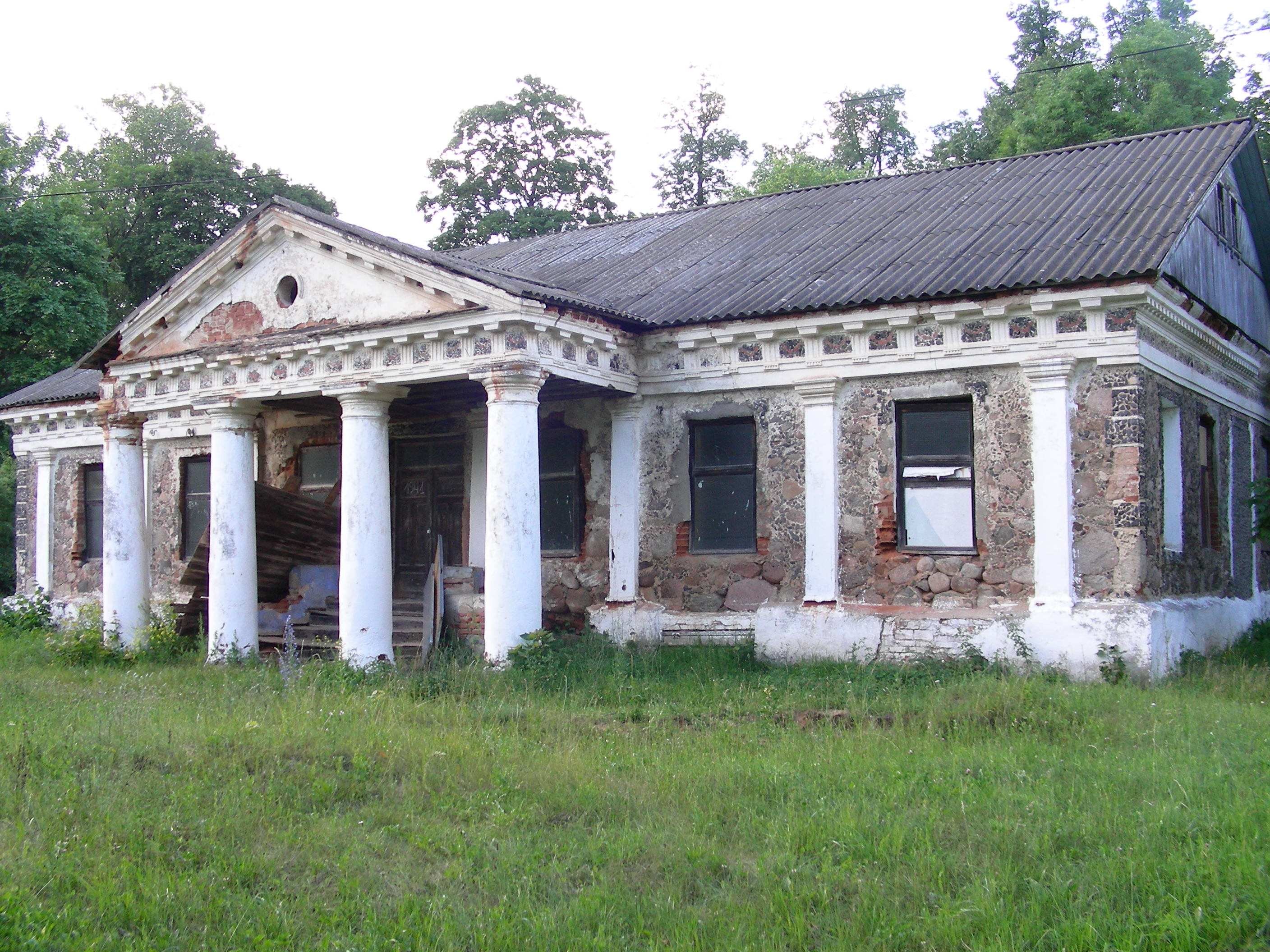 Беларуская (тарашкевіца): Фрагмэнты былой сядзібы «Кухцічы»: кальвінскі збор, парк, афіцына, гаспадарчыя пабудовы, стайня, млын. пас. Першамайск This is a photo of Belarusian heritage monument. Reference number: 612Г000628 ( WLM)